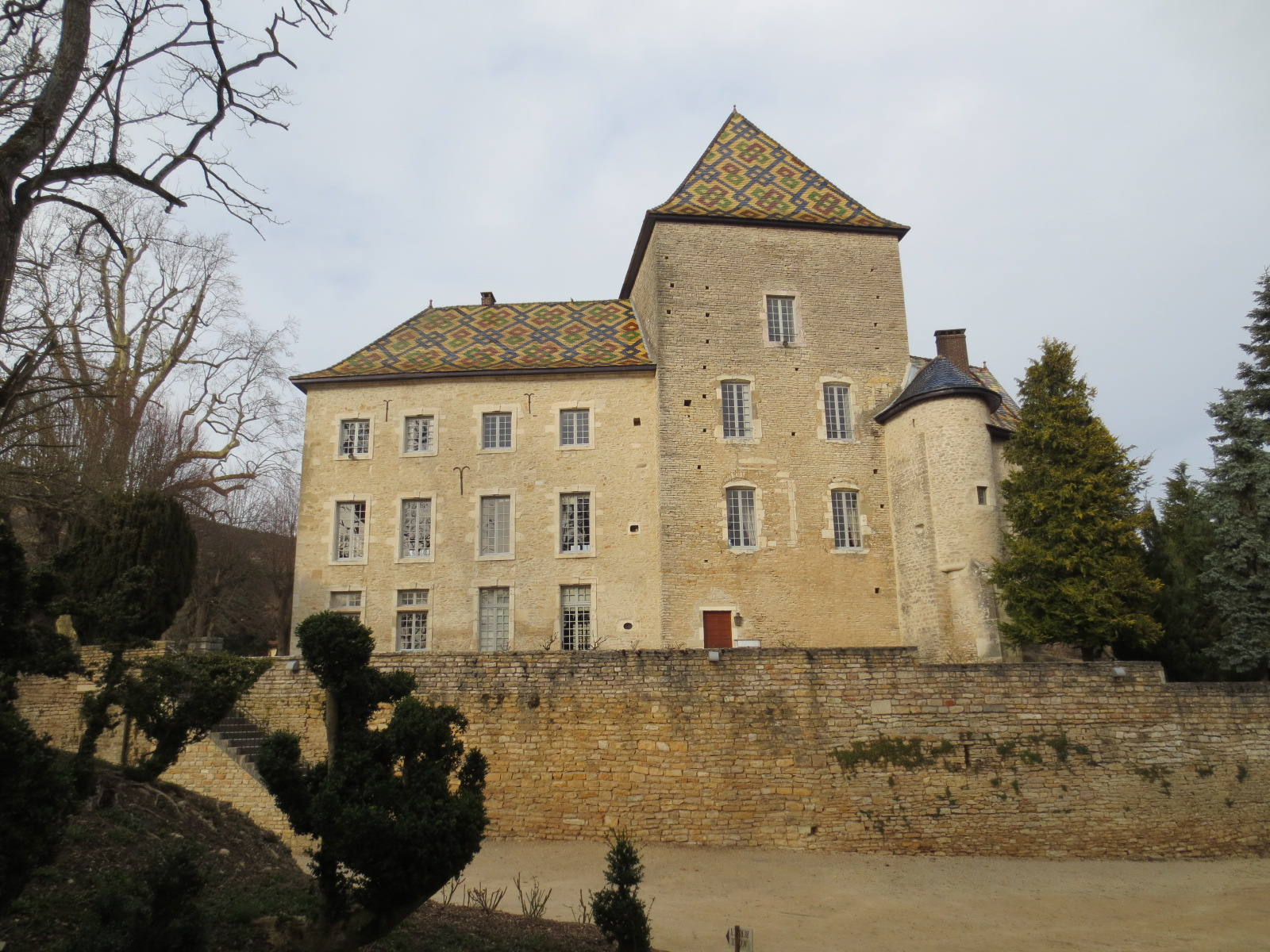 Château de Santenay